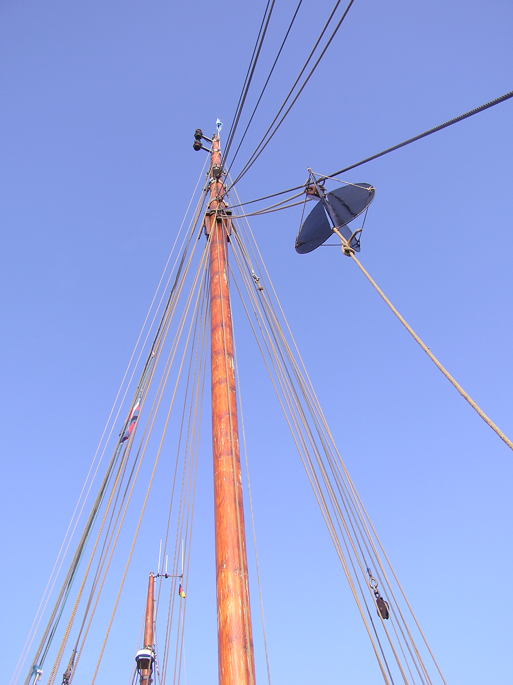 Ankerball.